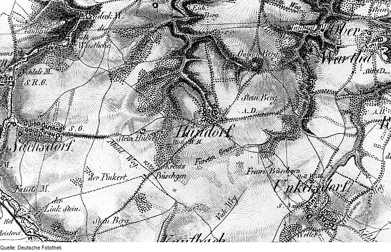 Original image description from the Deutsche Fotothek Klipphausen-Hühndorf. Oberreit, Sect. Dresden, 1821/22